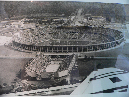 Stade Olympique de Berlin en 1936Berlin olympic stadium 1936